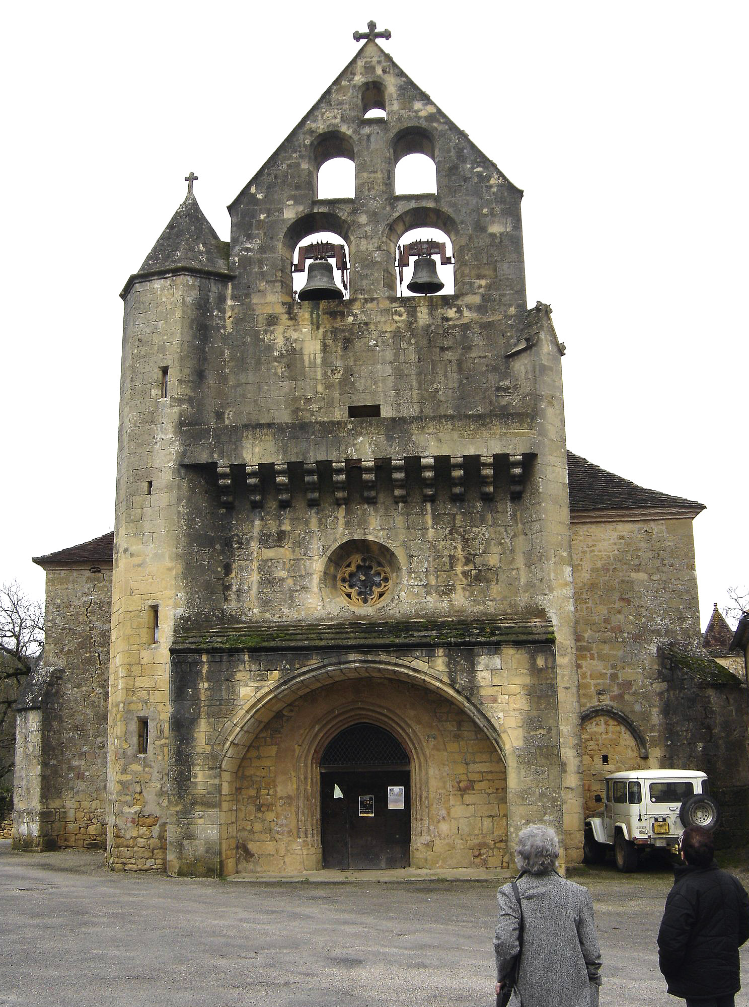 Église Saint-Sixte de Lamothe-Fénelon